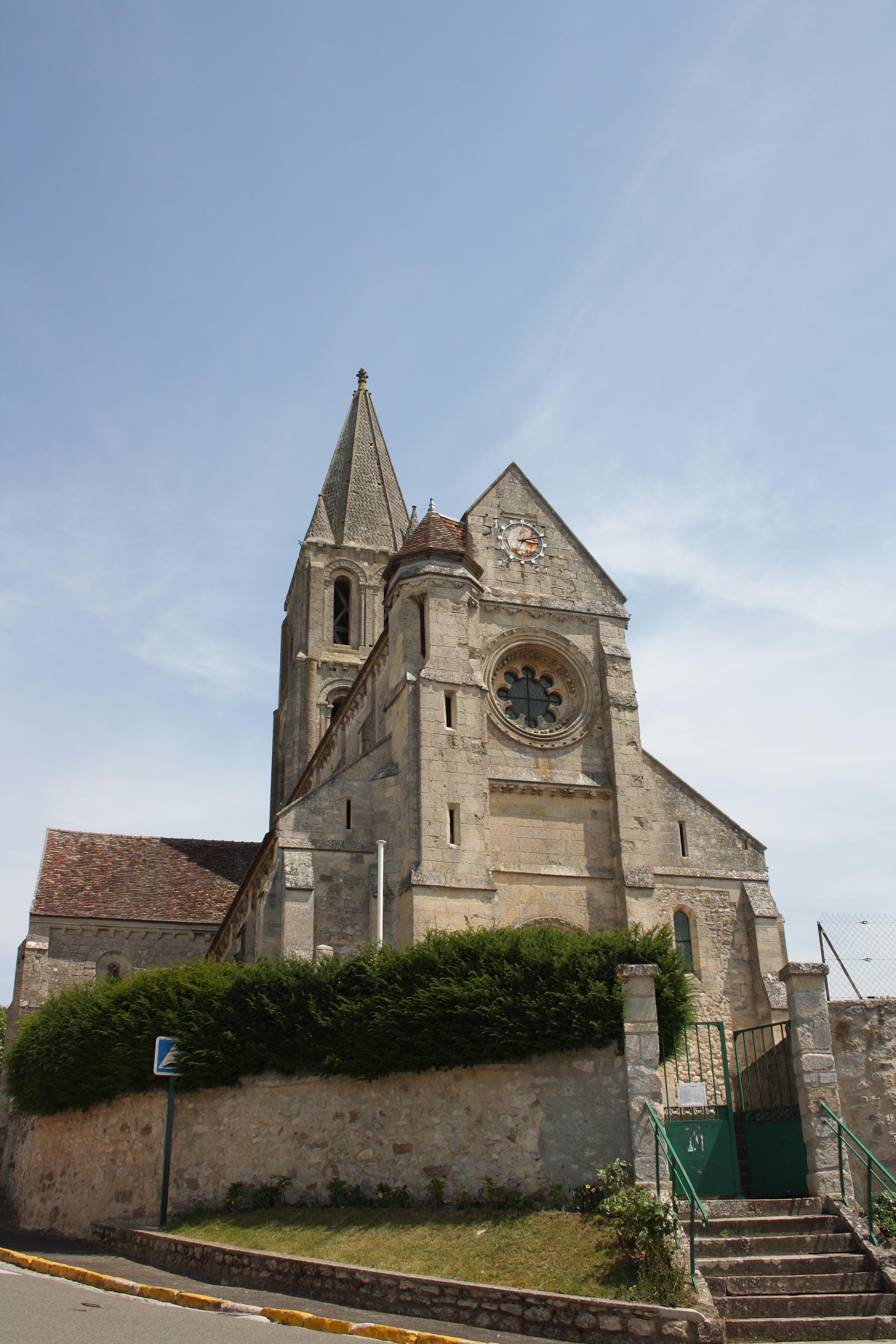 katholische Kirche Saint-Sulpice in Santeuil